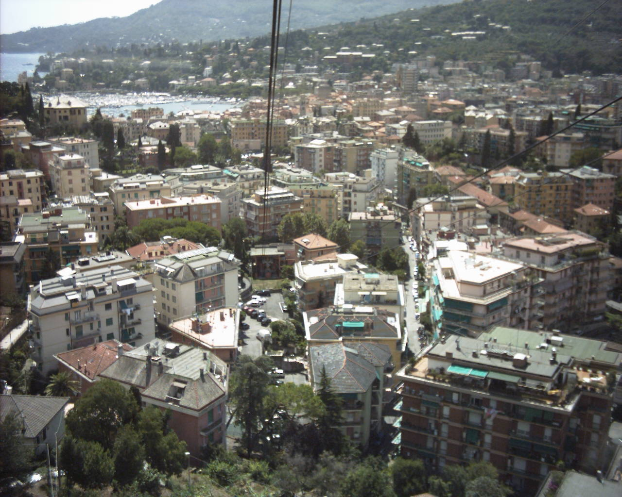 Panorama della città dalla cabina della Funivia Rapallo-Montallegro